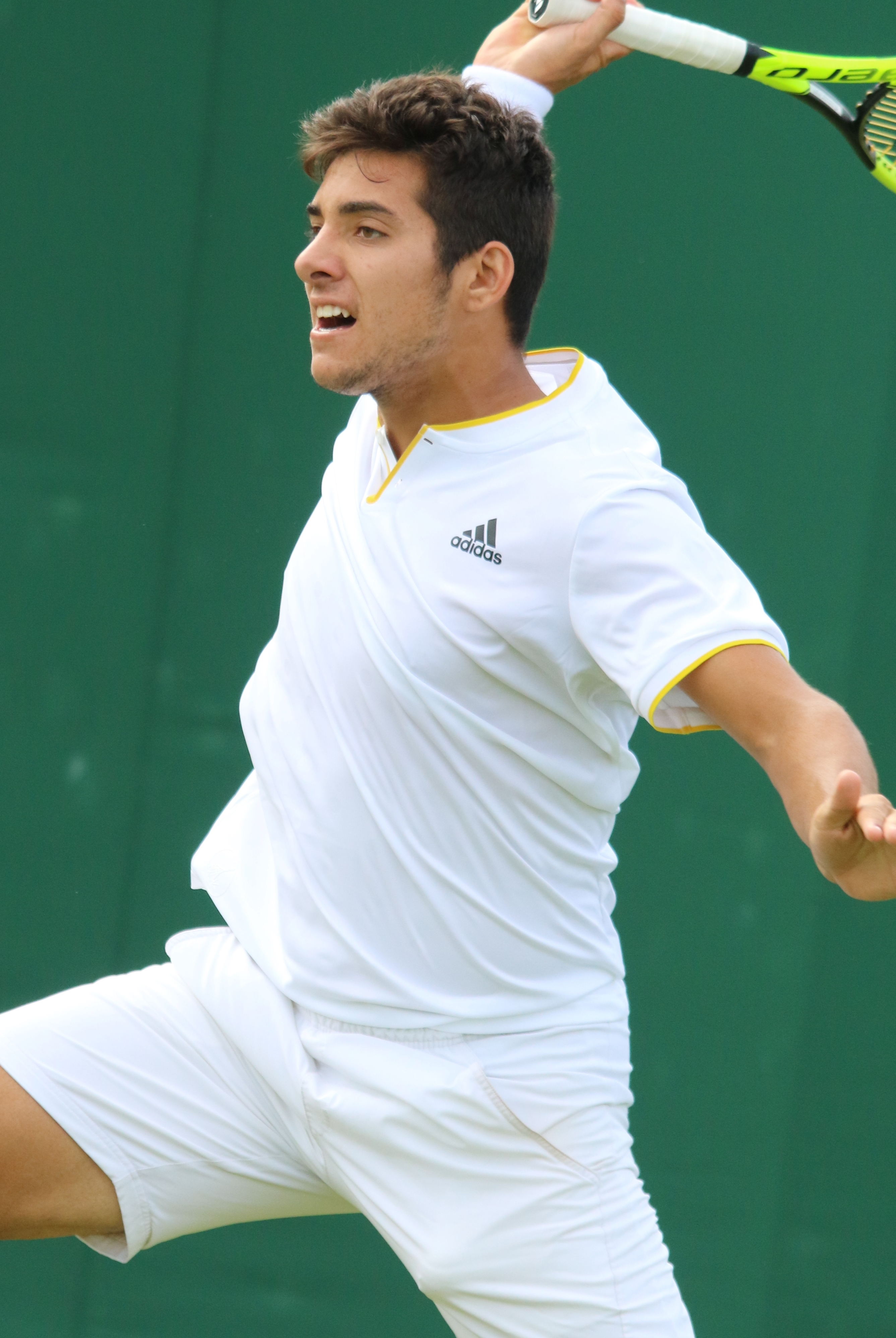 Garin WM17 (26)